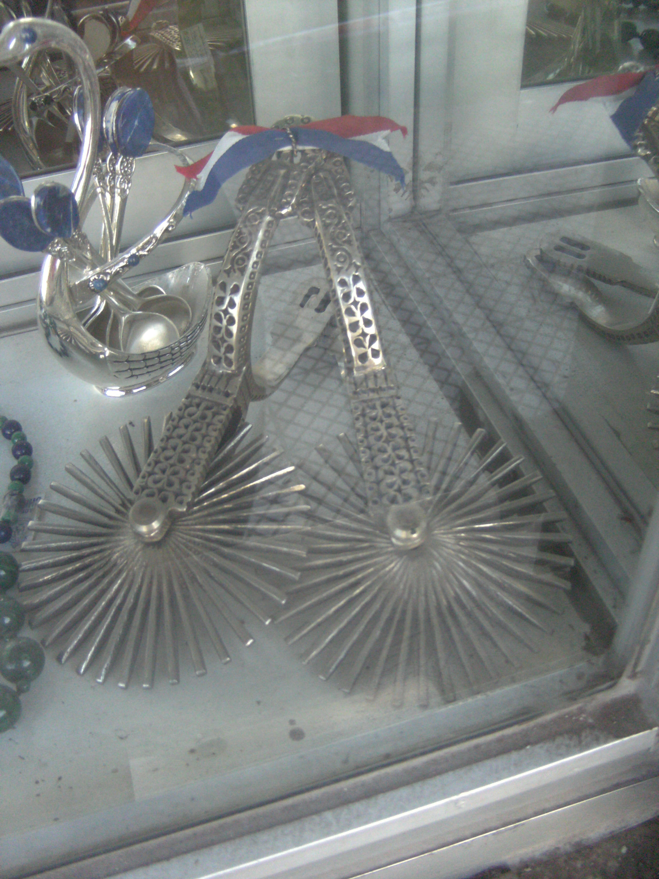 Espuelas tipo chilenas de plata alemana (alpaca) fundidas en molde, del tipo económicas para turistas. Se caracterizan por el gran rodaja que minimiza el posible daño al caballo